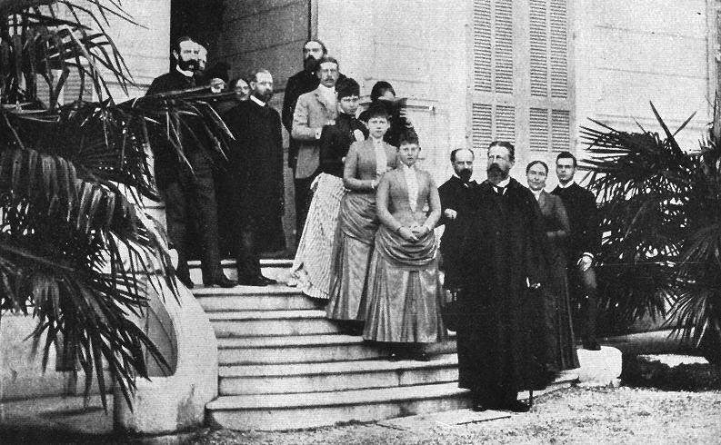 O Príncipe-herdeiro Frederico da Prússia em San Remo. Kronprinz Friedrich Wilhelm mit Gefolge vor der Villa Zirio in San Remo. Das Photo zeigt den schon schwer krebskranken Kronprinzen an seinem letzten Aufenthaltsort vor der Rückkehr nach Deutschland. Von rechts: Dr. Hovell, Kronprinzessin Victoria, Kronprinz Friedrich Wilhelm, Graf Radolinski, die Prinzessinen Margarethe, Sophie und Viktoria, daneben (verdeckt) Gräfin Brühl, Prinz Heinrich, Freiherr von Seckendorff, Dr. Schrader, Mademoiselle de Perpignan, Mademoiselle Bujard, Graf Seckendorff, Herr von Rabe.